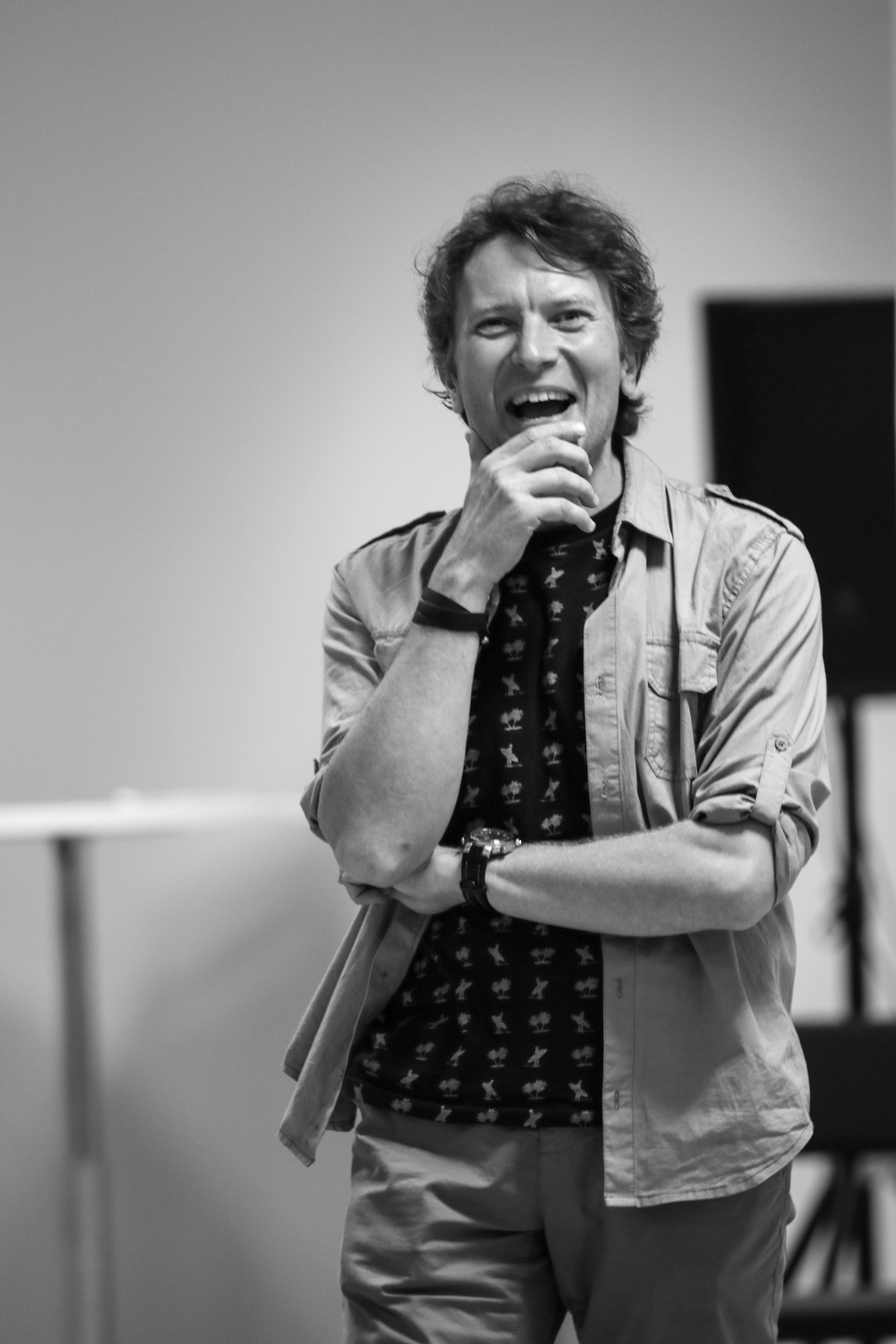 Foto: Heigo Teder